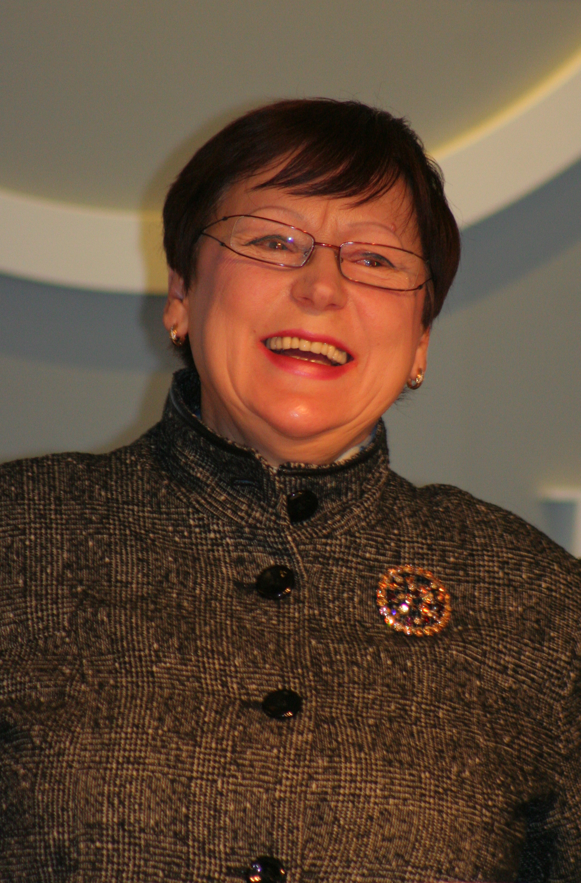 Russisch-deutsche Autorin Tatjana Kuschtewskaja während einer Buchpräsentation